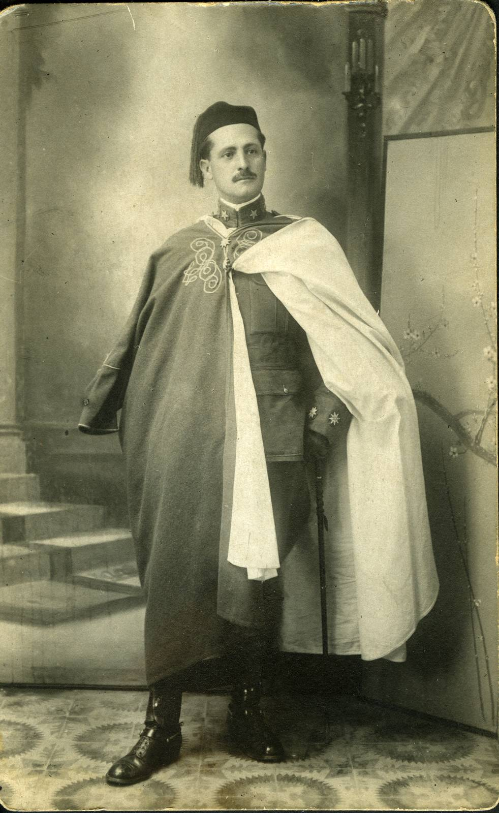 Fotografía de Ángel Rodríguez del Barrio (1916).